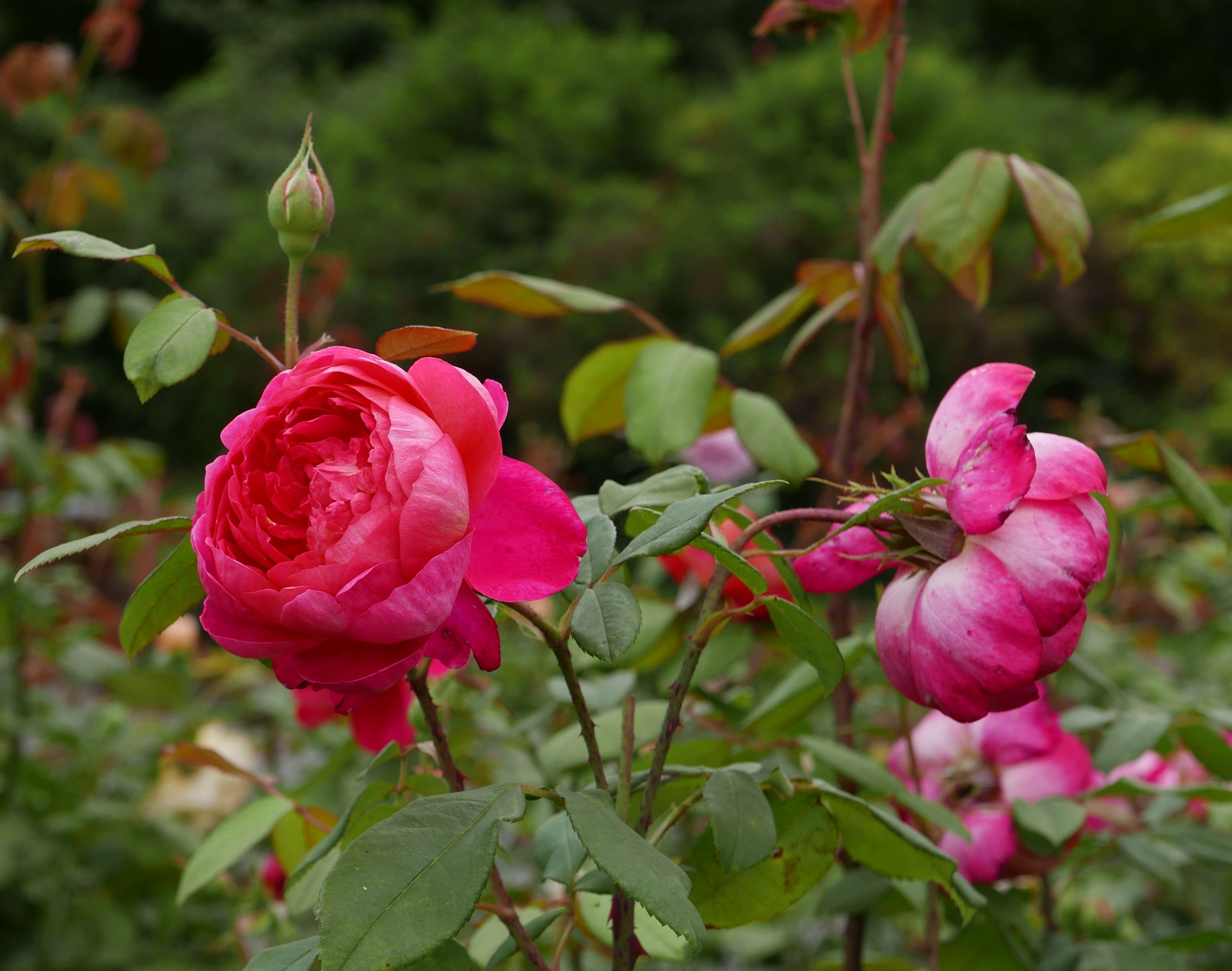 Rosa 'Benjamin Britten' David Austin 2001, Rosarium Sangerhausen, August 2017